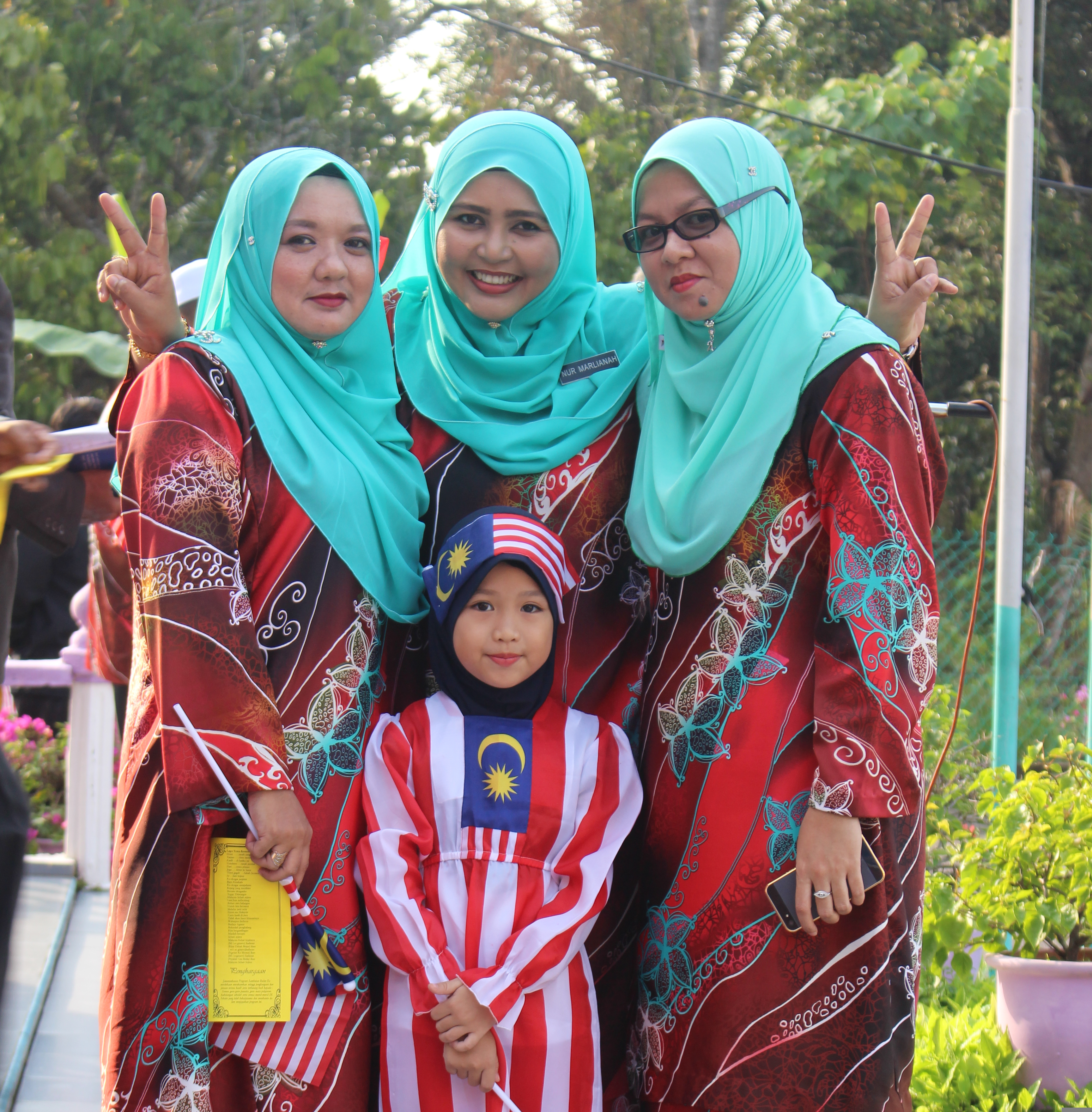 Manisss.....